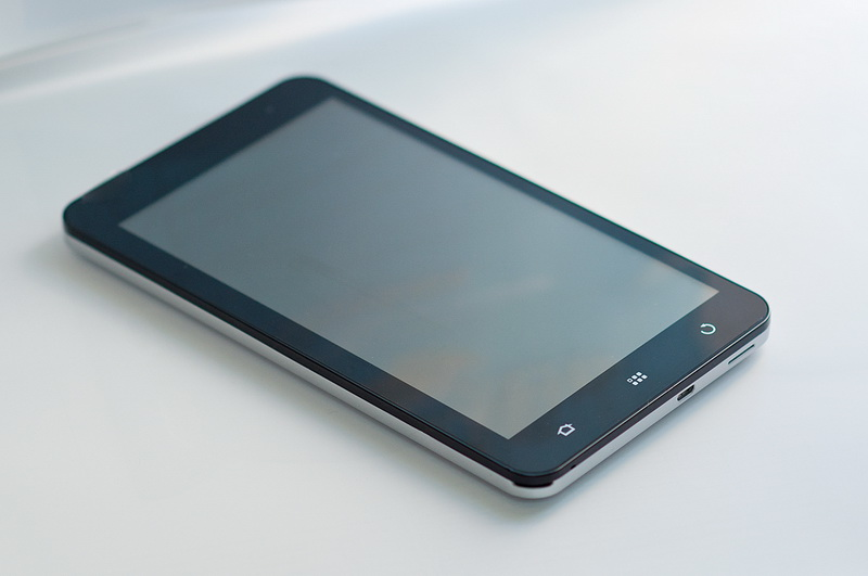 Планшет